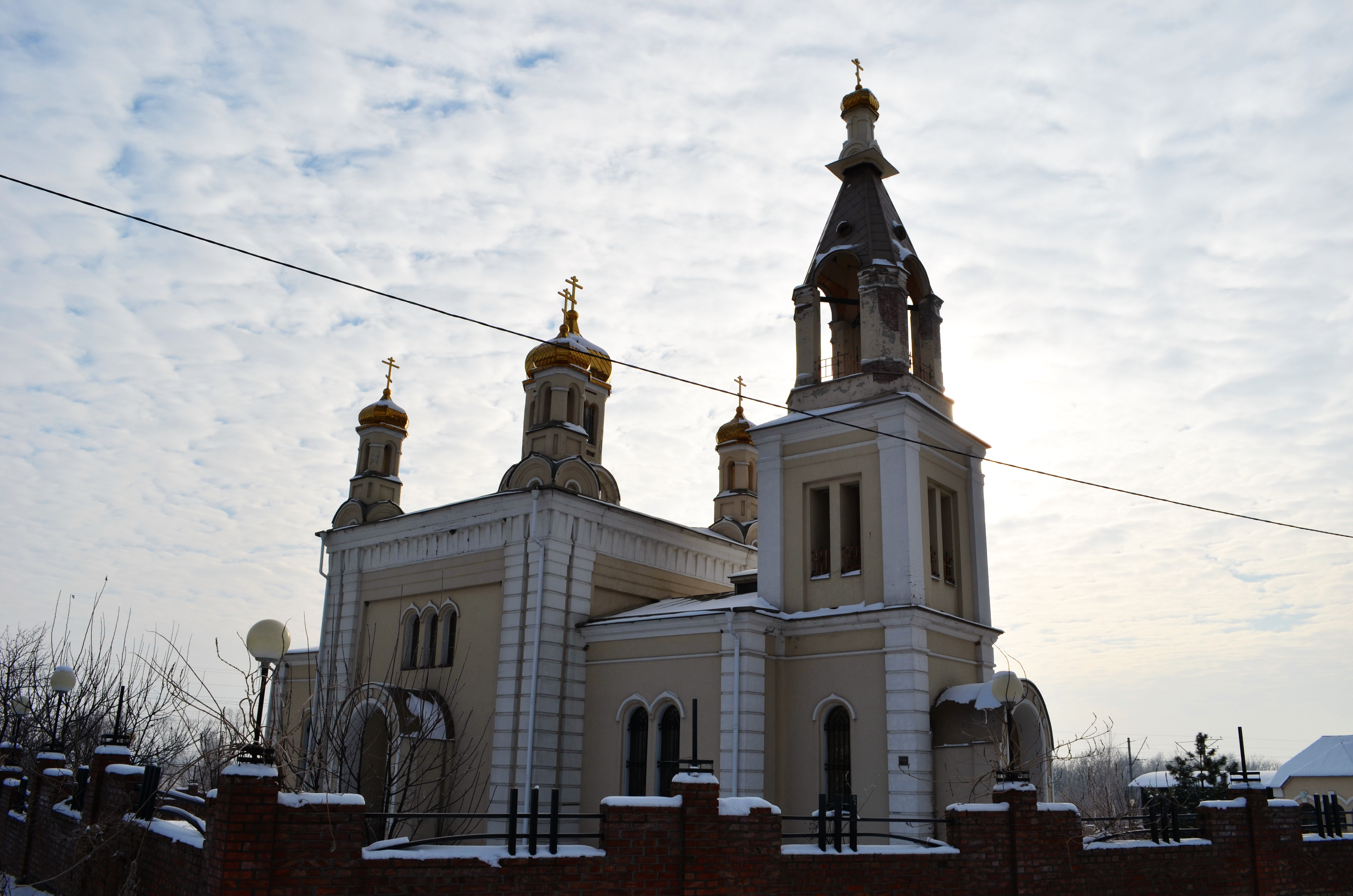 Домовая церковь Рождества Богородицы (усыпальница М.И. Платова): Малый Мишкин, Аксайский район, Ростовская область